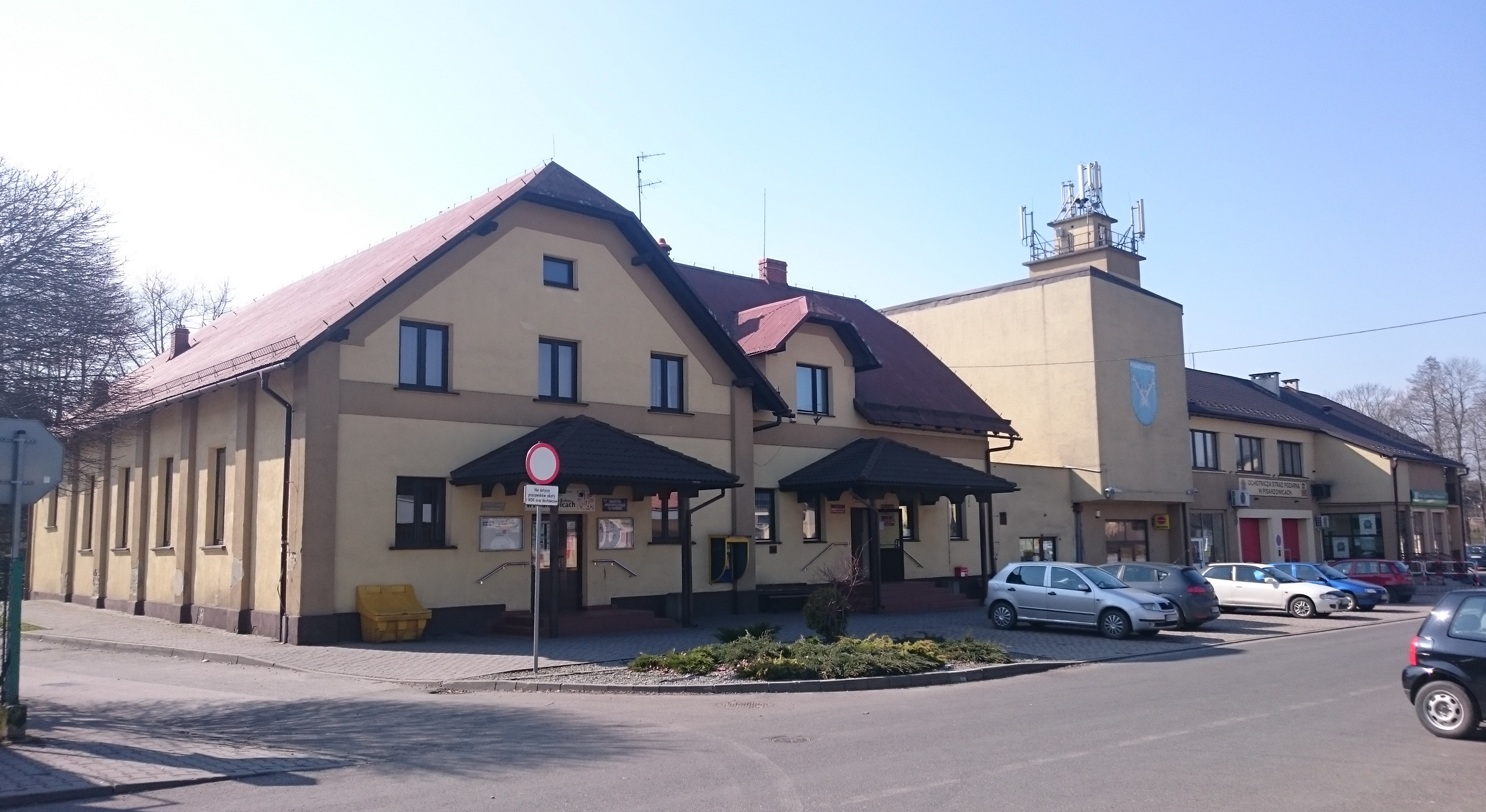 Centrum Pisarzowice: od lewej: Wielski Dom Kultury (zespół regionalny "Pisarzowianki", Tow. Sp.-Kult. "Dla Pisarzowic), Sołtys, Rada Sołecka, Zarząd Koła Emerytów i Rencistów, Biblioteka, Koło Pszczelarzy i Bartników, Ochotnicza Straż Pożarna